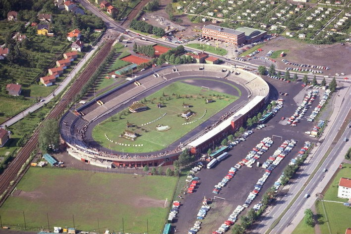 Jehova's Witnesses meeting at Ullevaal Stadion in Oslo, Norway